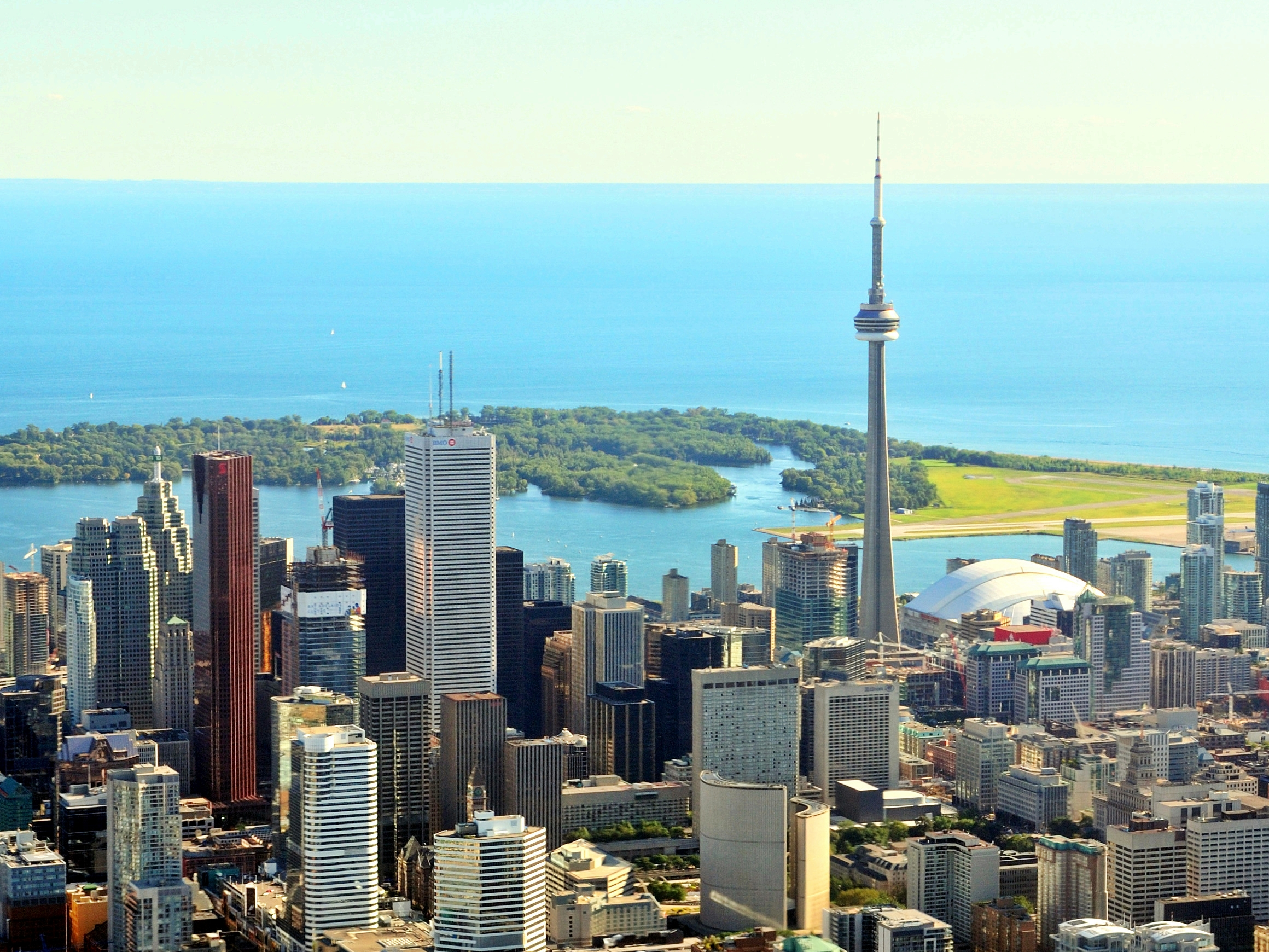 Toronto: Bereich Downtown mit CN Tower mit Blickrichtung nach Süden